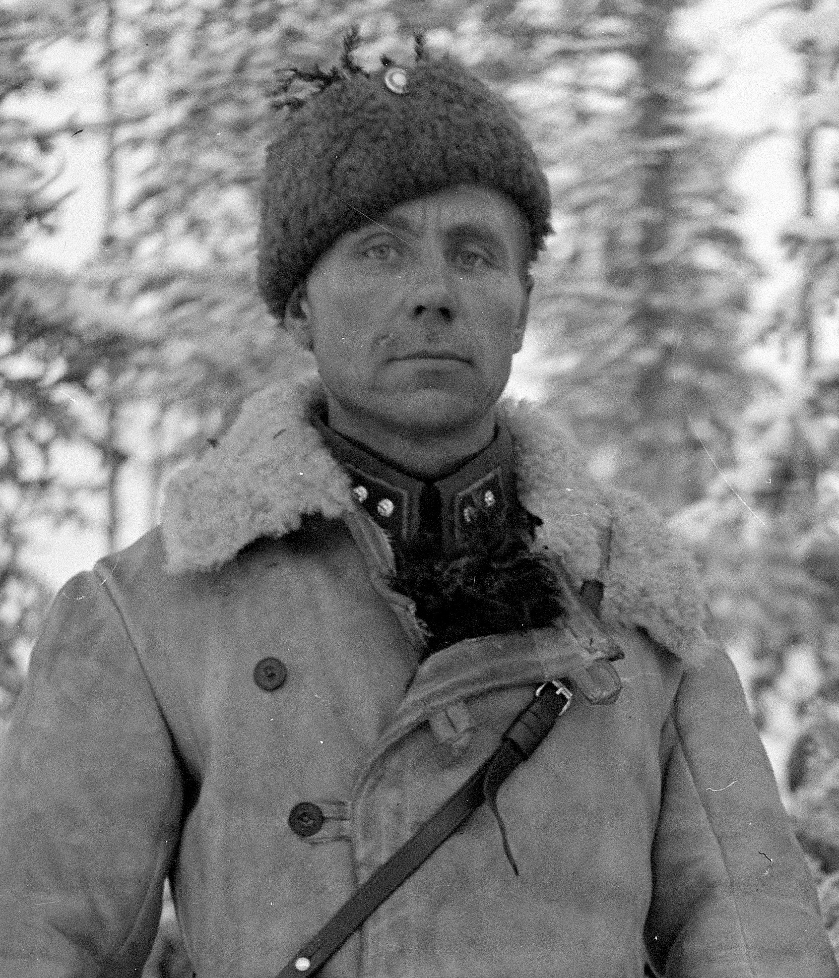 Aarne Juutilainen talvisodassa 1939.